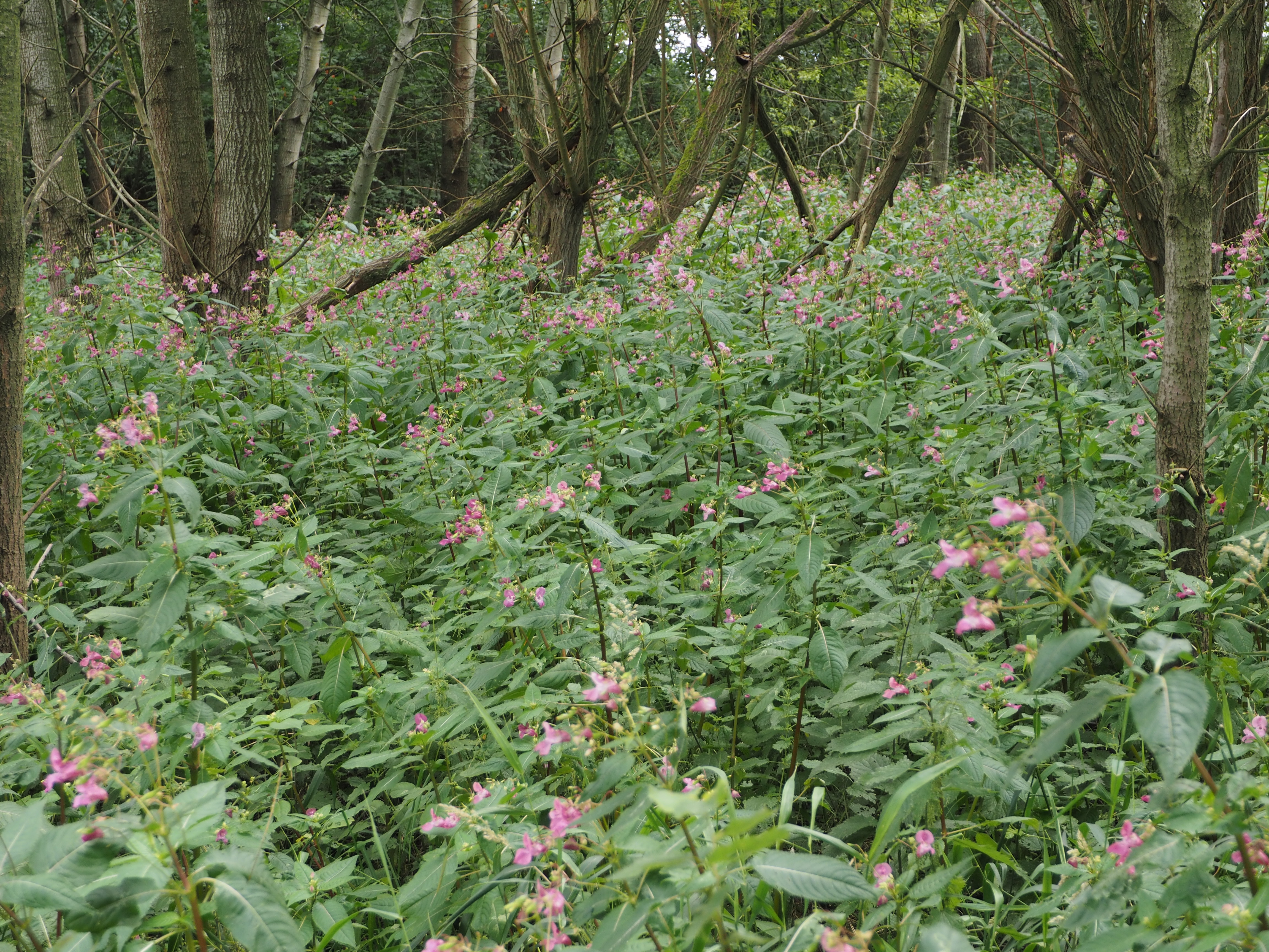 Drüsiges Springkraut (Impatiens glandulifera), Südheide, Germany